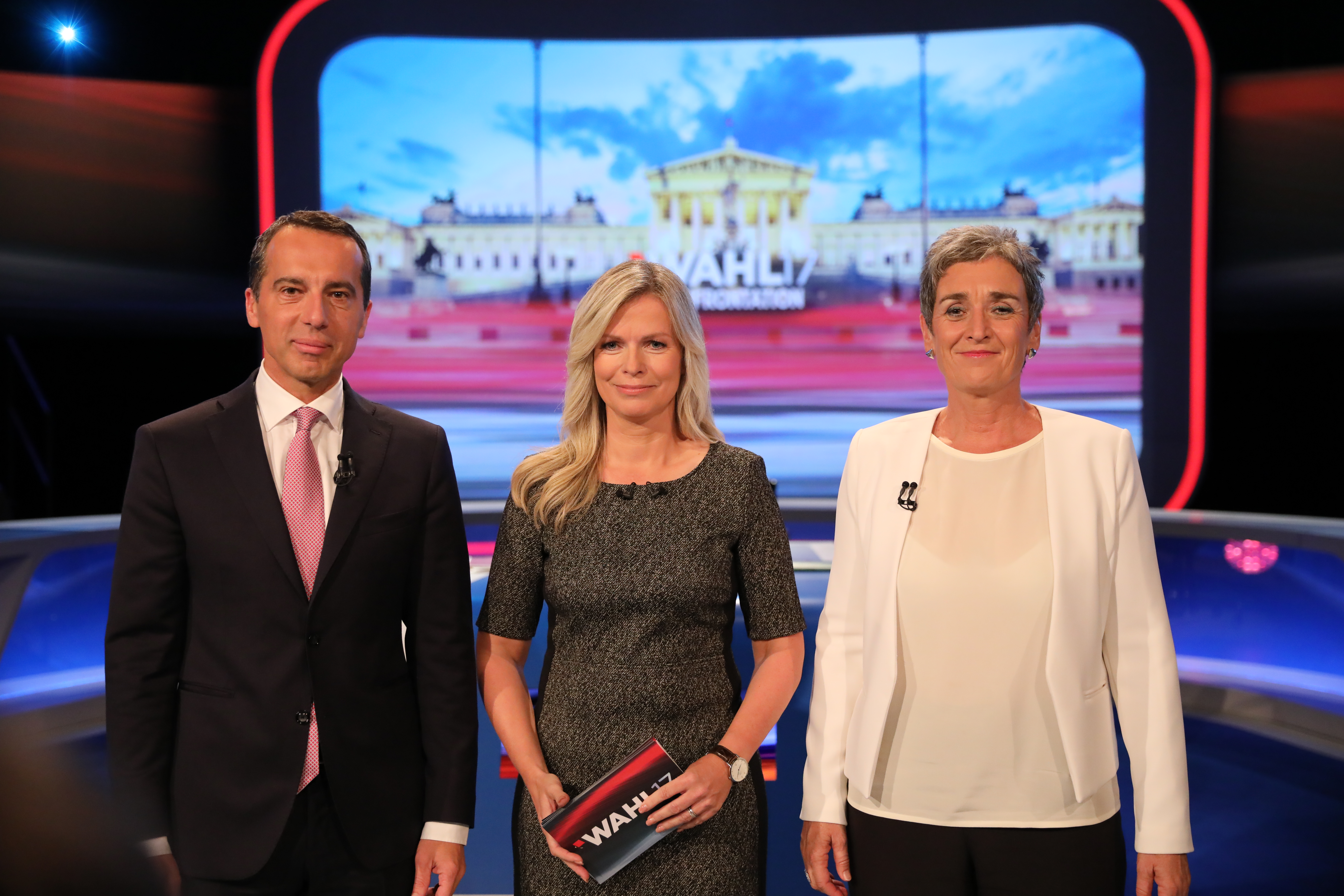 ORF-TV Duell mit Bundeskanzler Kern: Christian Kern, Claudia Reiterer und Grünen-Chefin Lunacek am 26. September 2017 (Fotos: SPÖ/Zach-Kiesling).